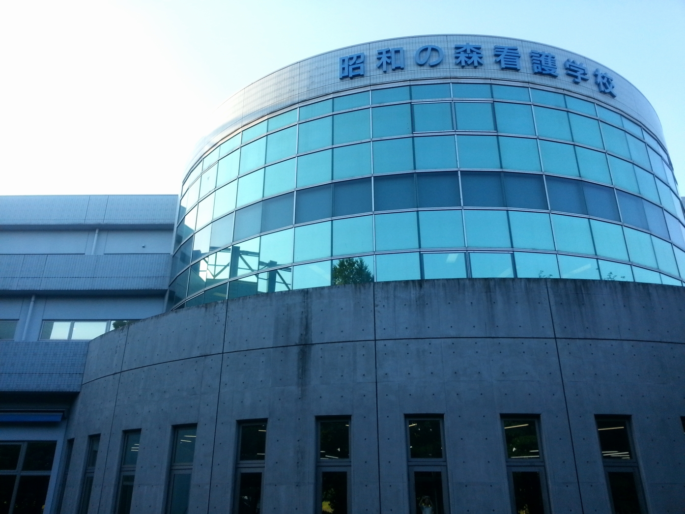 災害医療センター附属昭和の森看護学校 外観